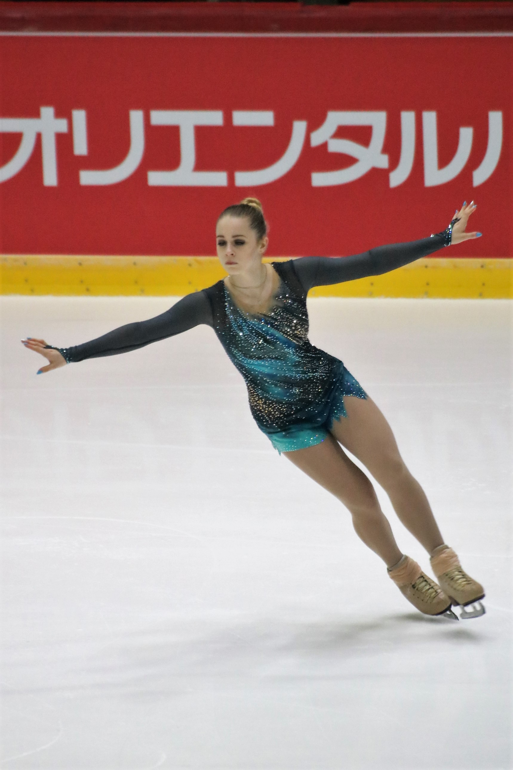 Дарья Паненкова (Россия) на Гран-при Хельсинки 2018.